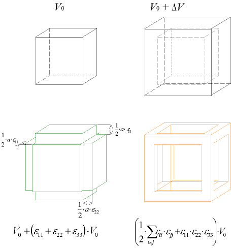 Approximation faite lors de l'évaluation de la variation de volume par la trace du tenseur des déformations. Haut : volume avant et après déformation ; bas : après déformation, le volume approximatif est en vert et la partie négligée en orange. Auteur : Christophe Dang Ngoc Chan (Cdang) Approximation done when evaluating the volume change with the trace of the strain tensor. Top : volume before and after deformation; bottom: after deformation, the approximate volume is in green and the neglected part in orange. Author : Christophe Dang Ngoc Chan (Cdang)